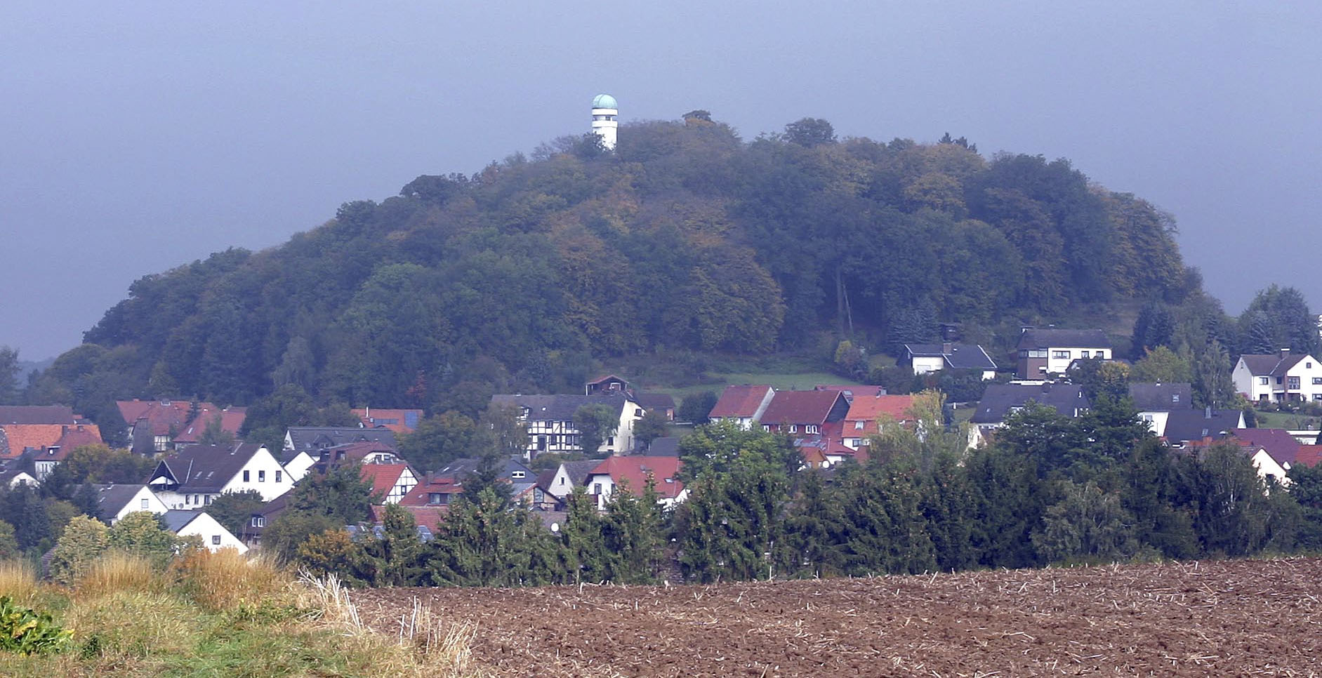 Häuschensberg mit Aussichtsturm und Volkssternwarte Rothwesten